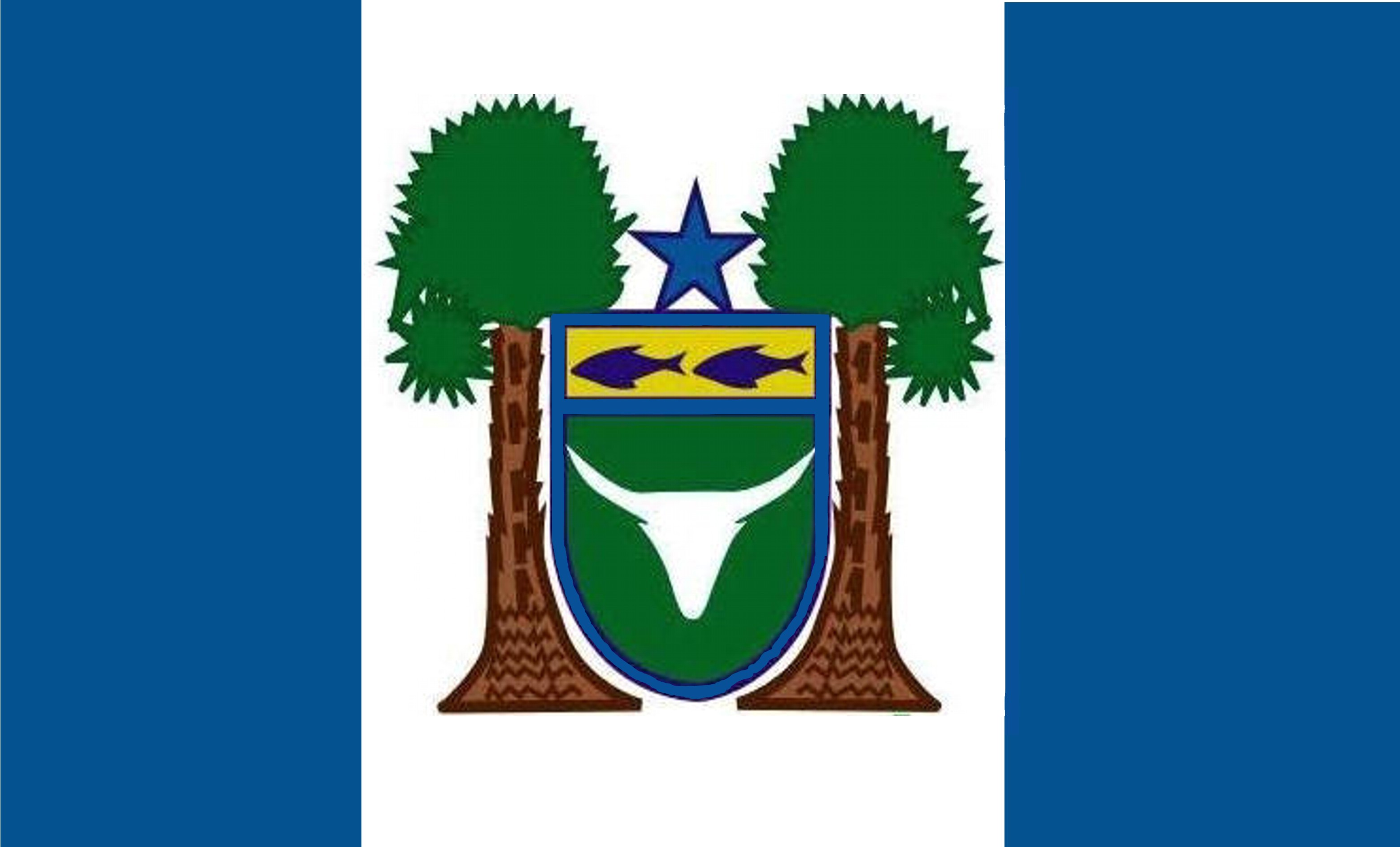 Bandeira da Cidade de Cariré-CE